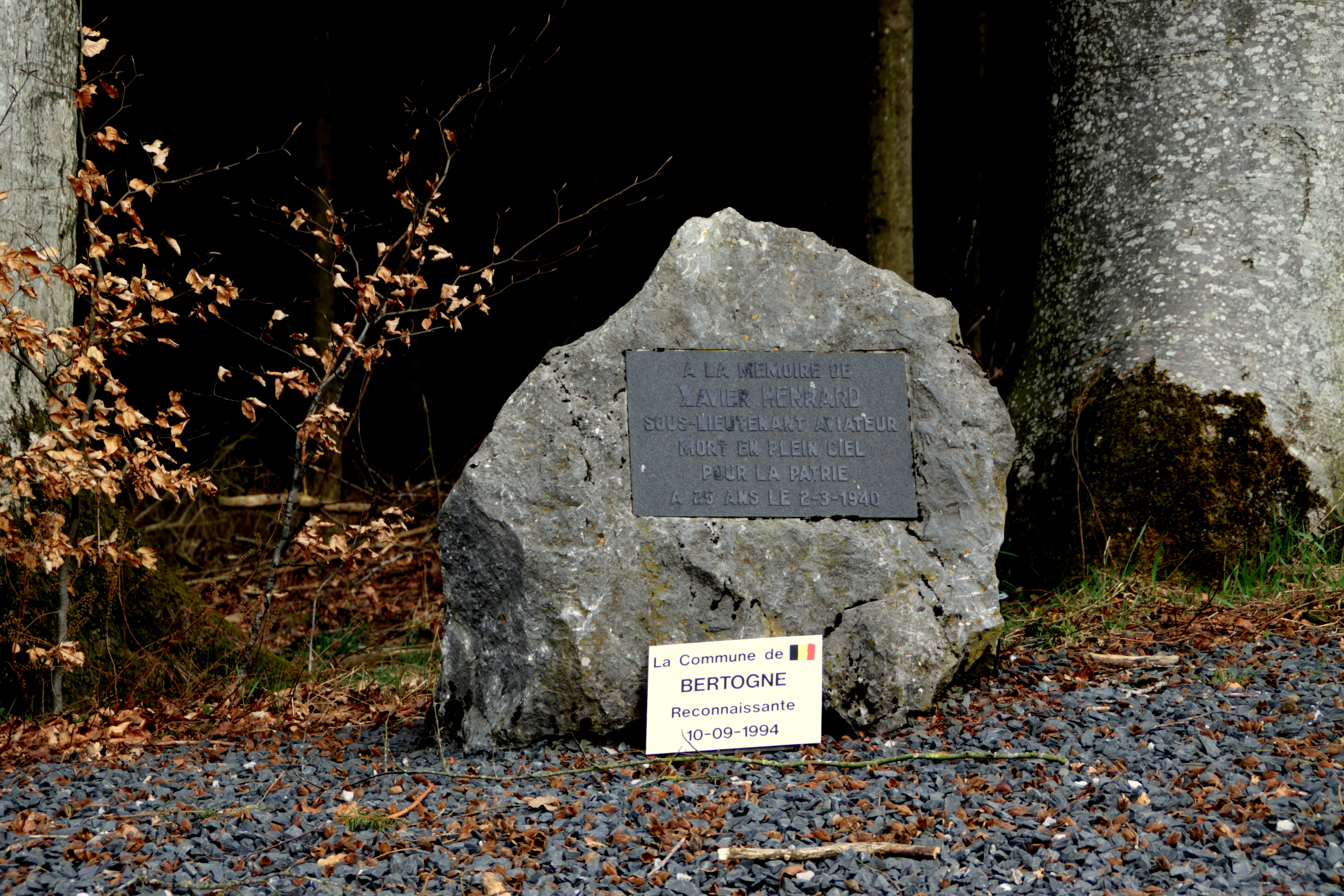 D'Monument Xavier Henrard an der Gewan vun Hemroulle